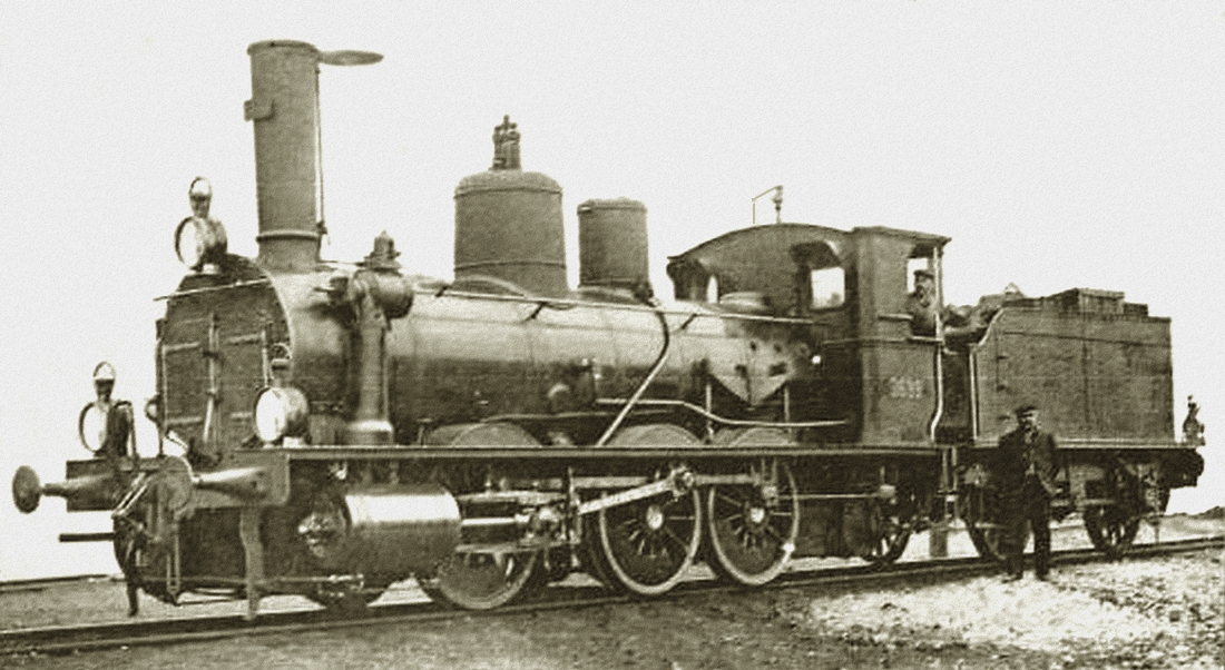 Ouest-Suisse (OS): Güterzuglokomotive vom Typ „Bourbonnais“, Serie D 3/3 Nr. 2 „La Côte“ (spätere SBB-Nummer 3699), gebaut 1858 von der Maschinenfabrik Cail, Paris, umgebaut 1888 in der Hauptwerkstätte der Jura-Simplon-Bahn in Yverdon Die umgebaute D 3/3 Nr. 503 von 1888, spätere SBB D 3/3 3699 (Bild), war die erste Verbund-Maschine der Schweiz. In der ursprünglichen Form als OS-Nr. 2 hatte sie einen offenen, lediglich durch einen kleinen Schirm geschützten Führerstand. Beim Umbau 1888 erhielt sie zusätzlich zum neuen Kessel auch ein Führerhaus. Die Lokomotive wurde 1913 ausrangiert.